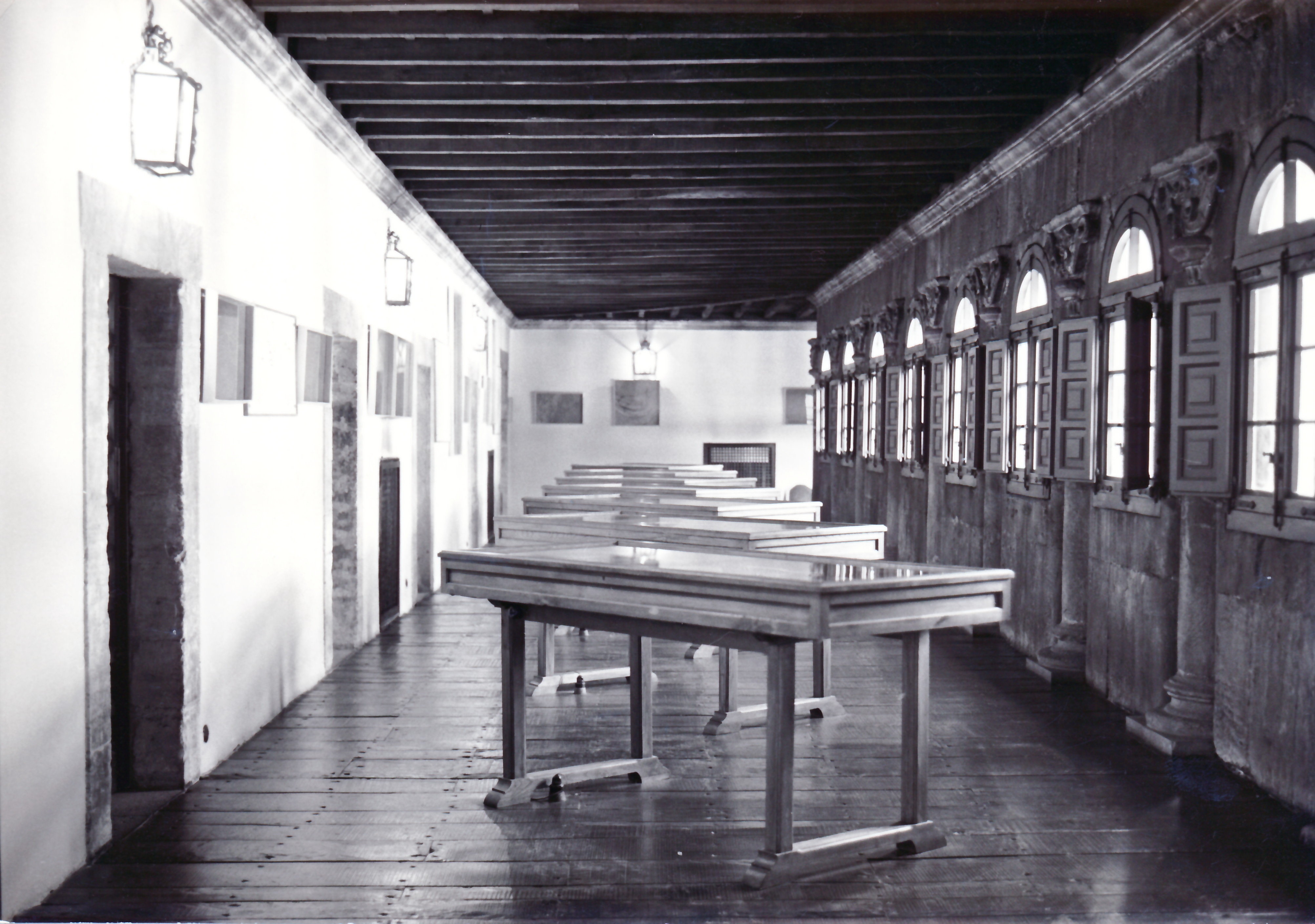 Exposición anterior a la reforma de 2010